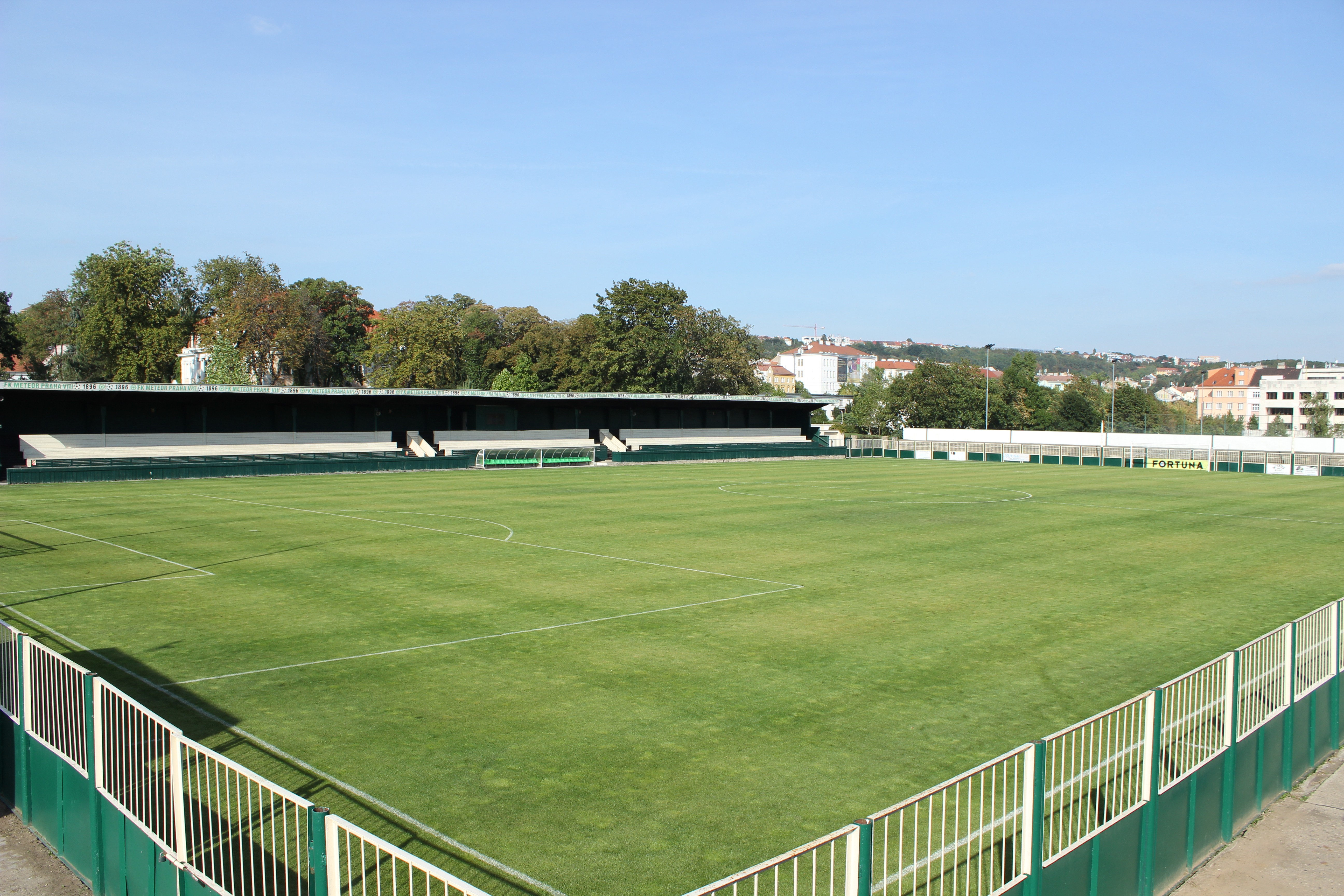 Hřiště fotbalového klubu Meteor Praha VIII v pražské Libni.